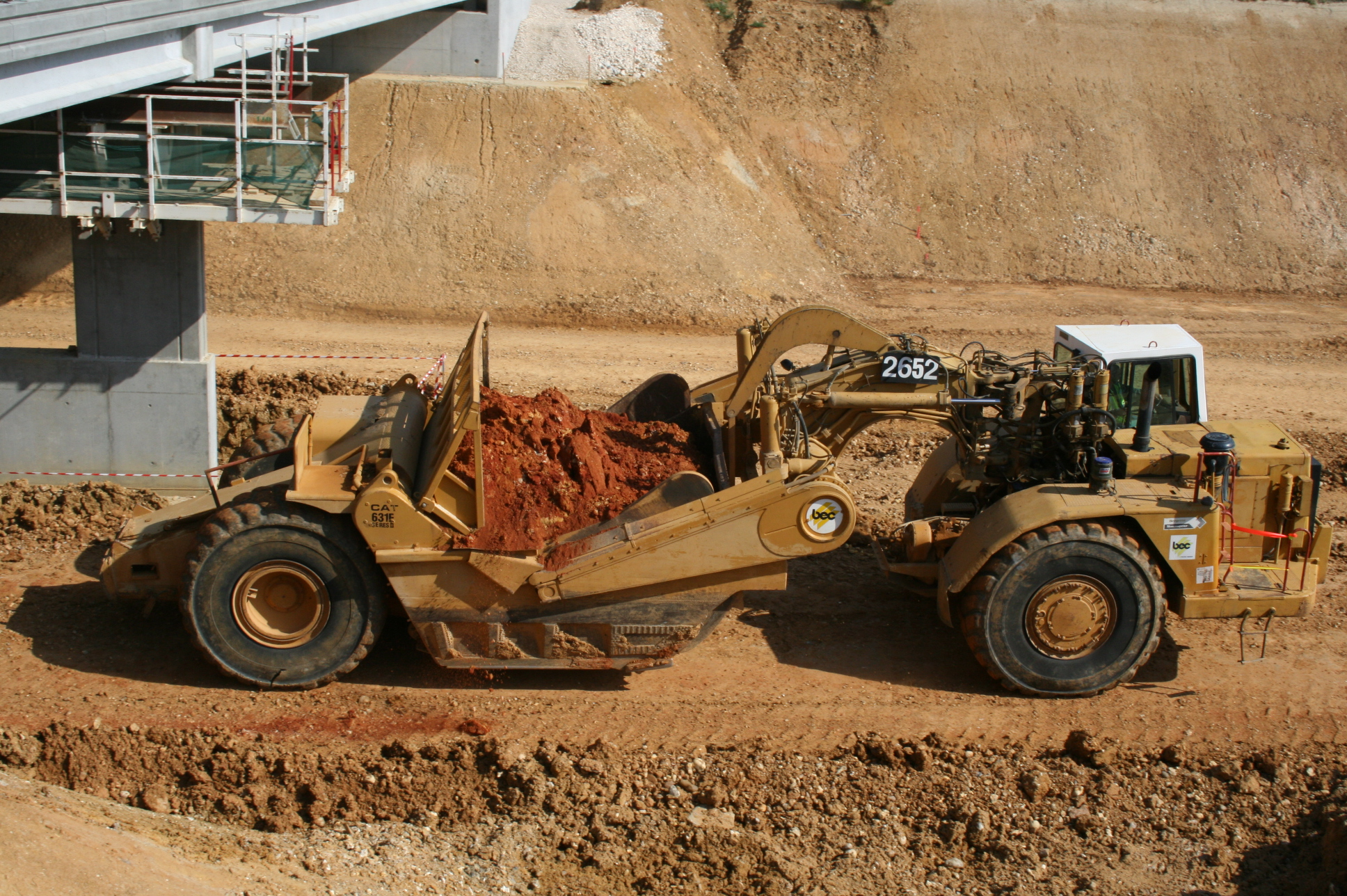 Autoroute A19 – Décapeuse (scraper) utilisée pour les terrassements